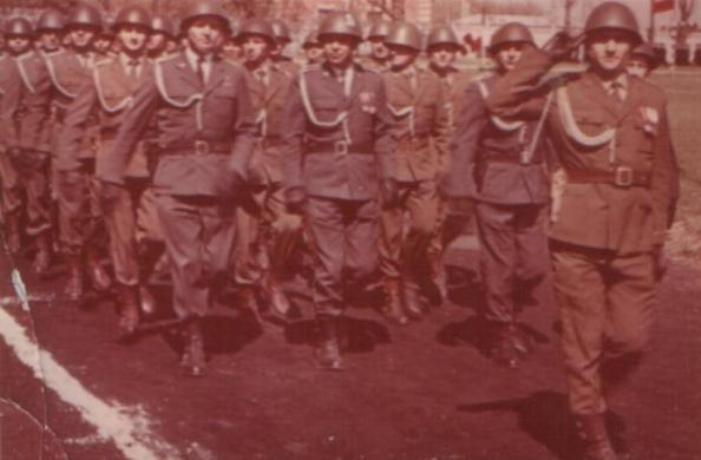 Garnizon Przasnysz. Kadra JW 4420 podczas defilady